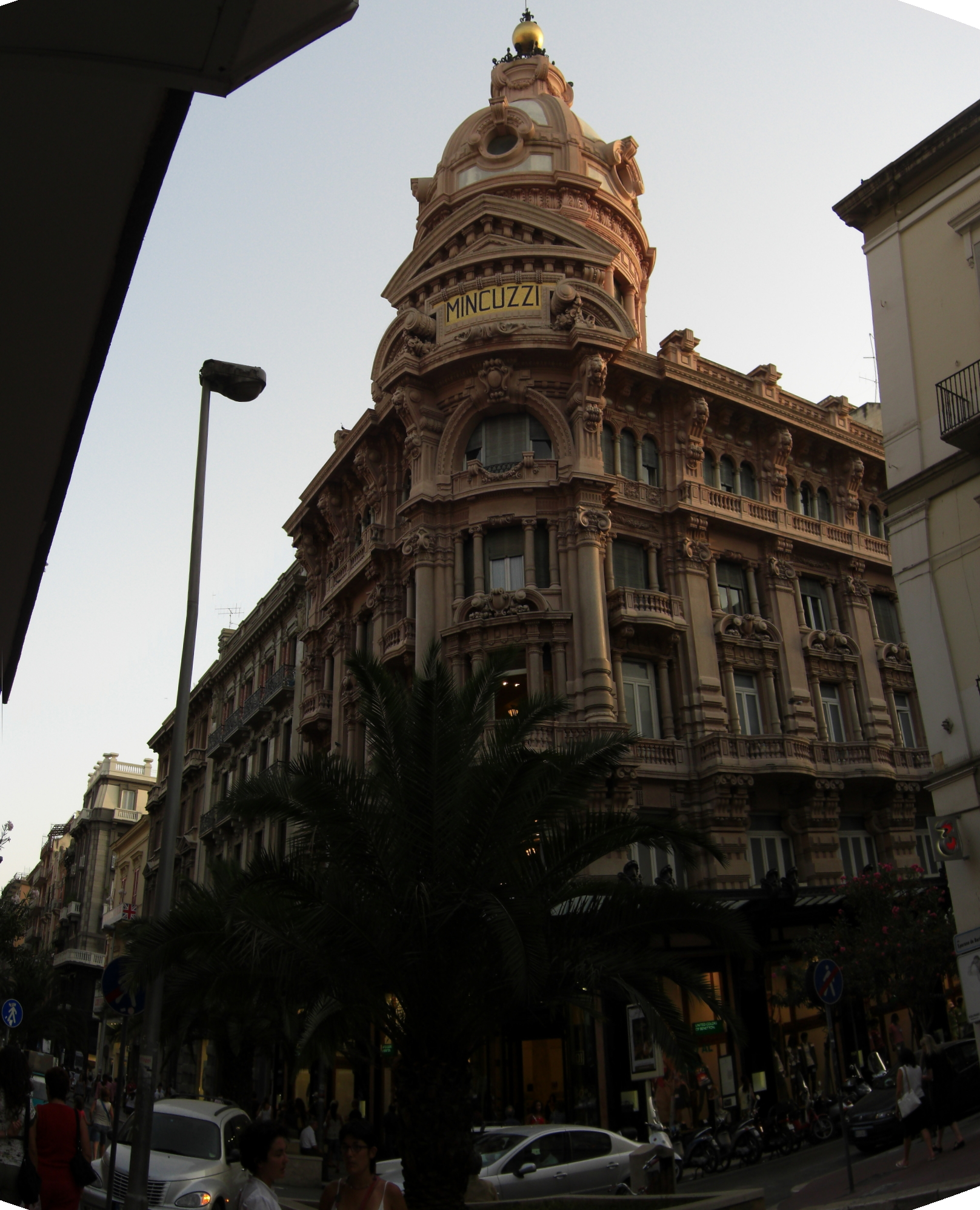 un antico palazzo di Bari